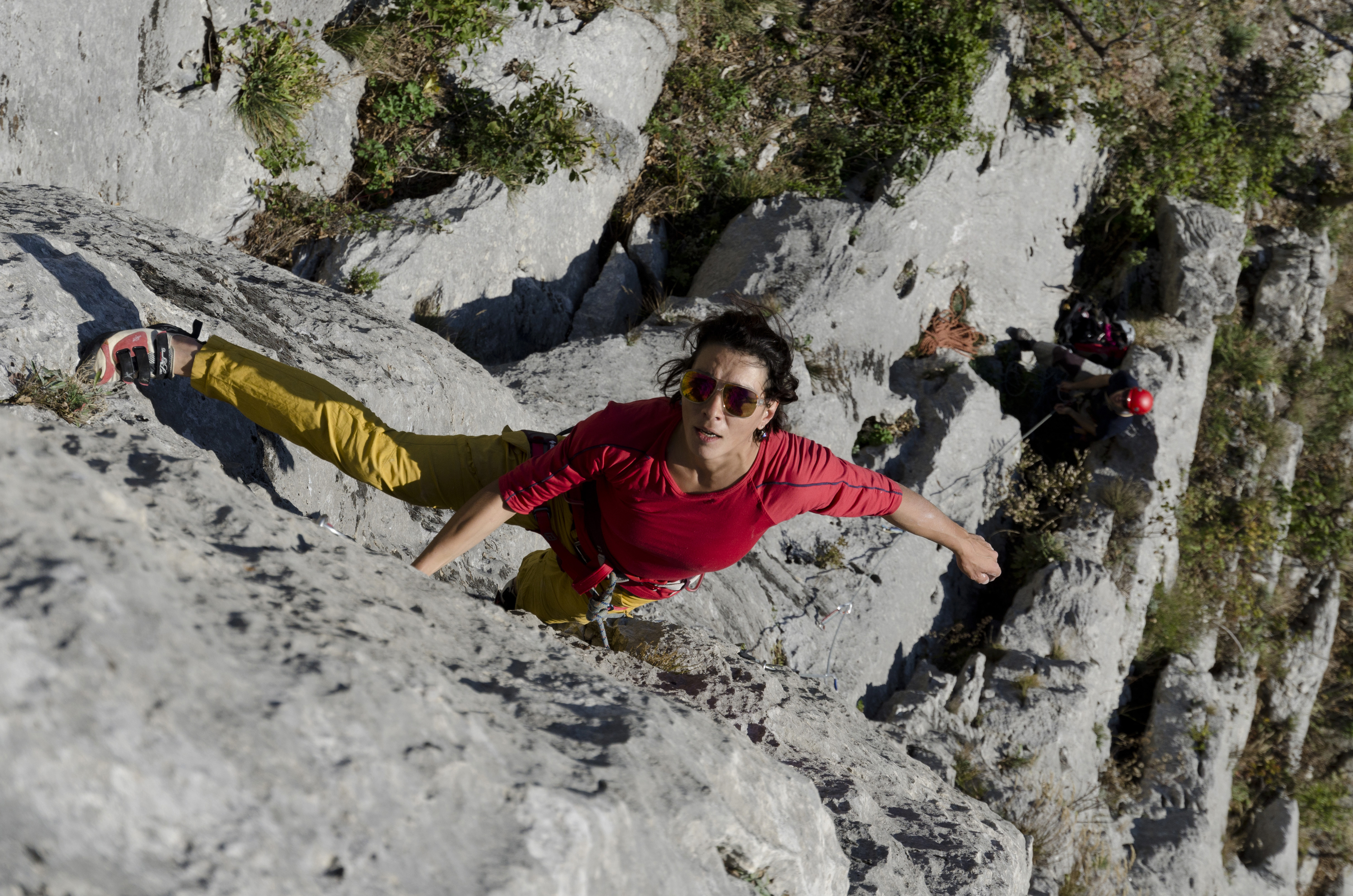 Катерене на Враца.